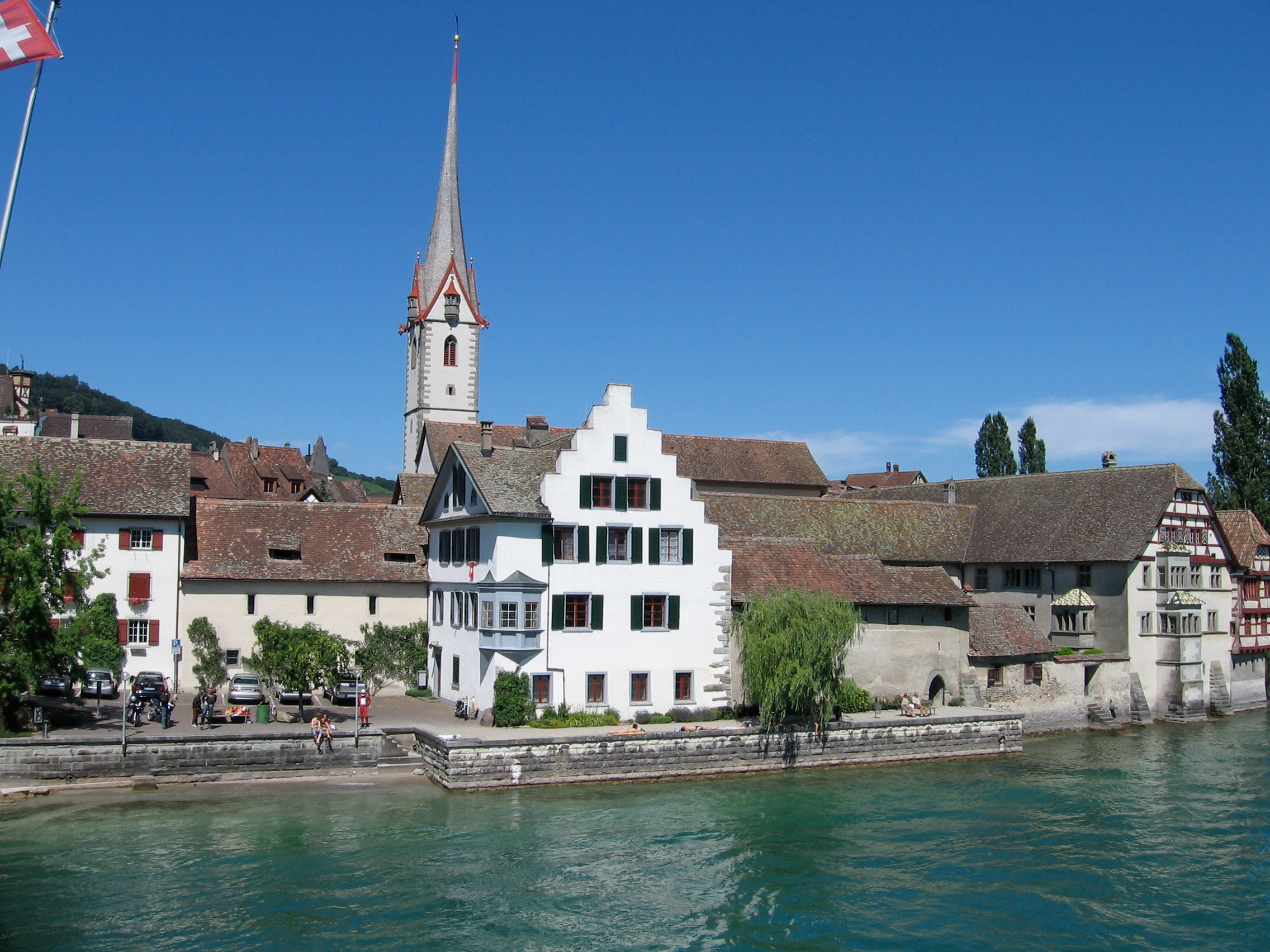 Kloster St. Georgen, Stein am Rhein